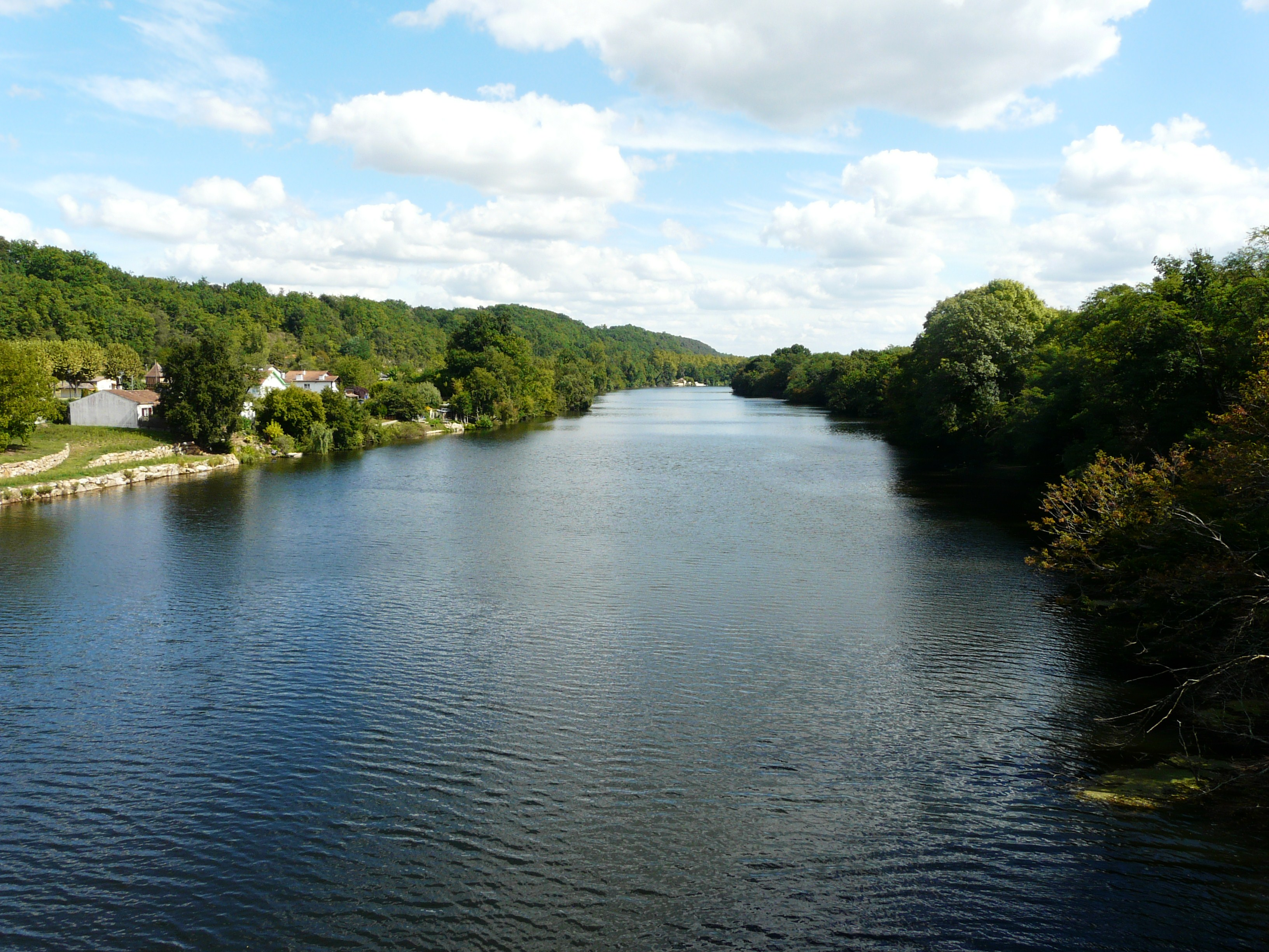 La Dordogne en amont du pont de Saint-Capraise-de-Lalinde, Dordogne, France. Elle sert de limite entre Saint-Capraise-de-Lalinde à gauche et Varennes à droite.